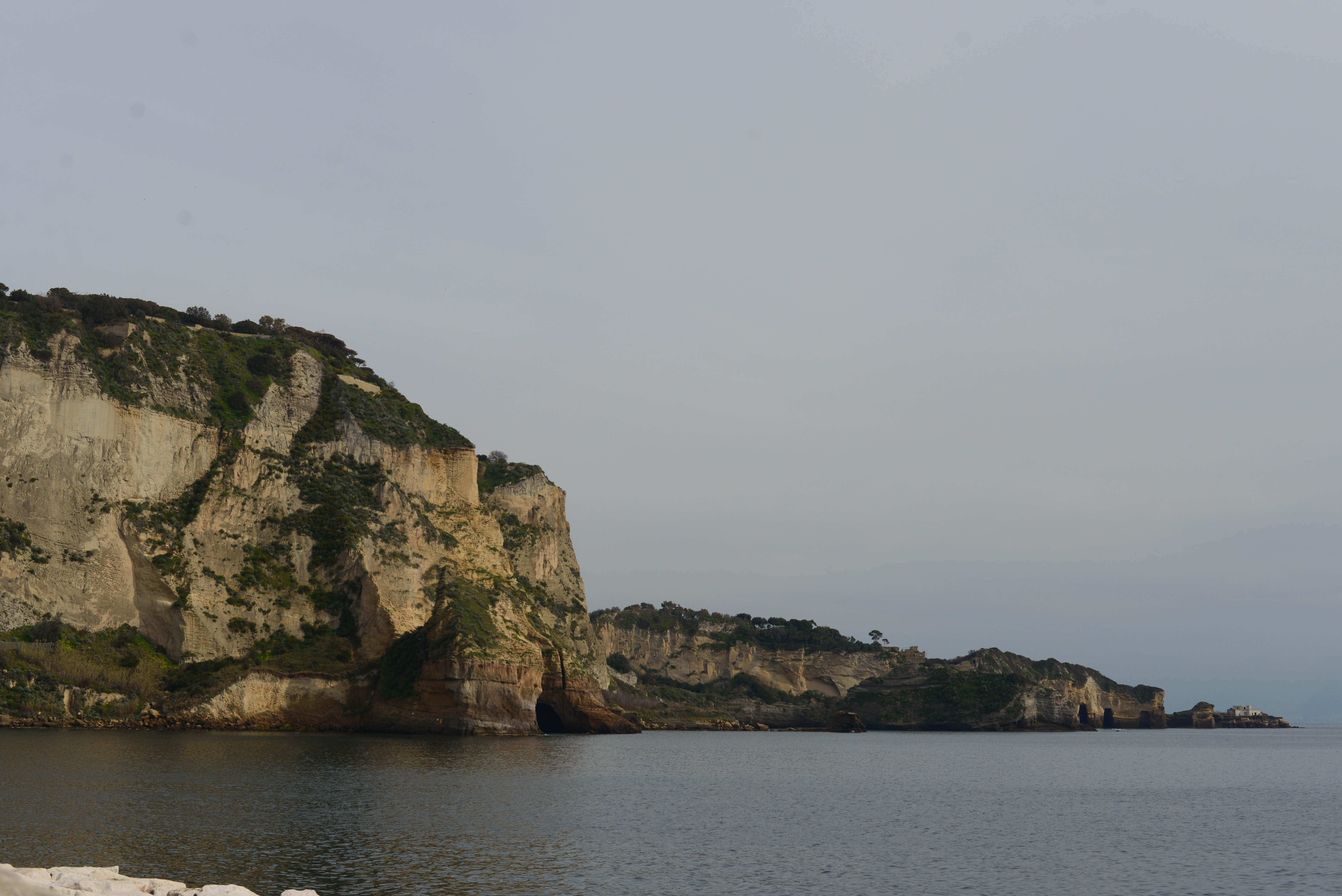 Capo Posillipo, visto dalla strada di Nisida